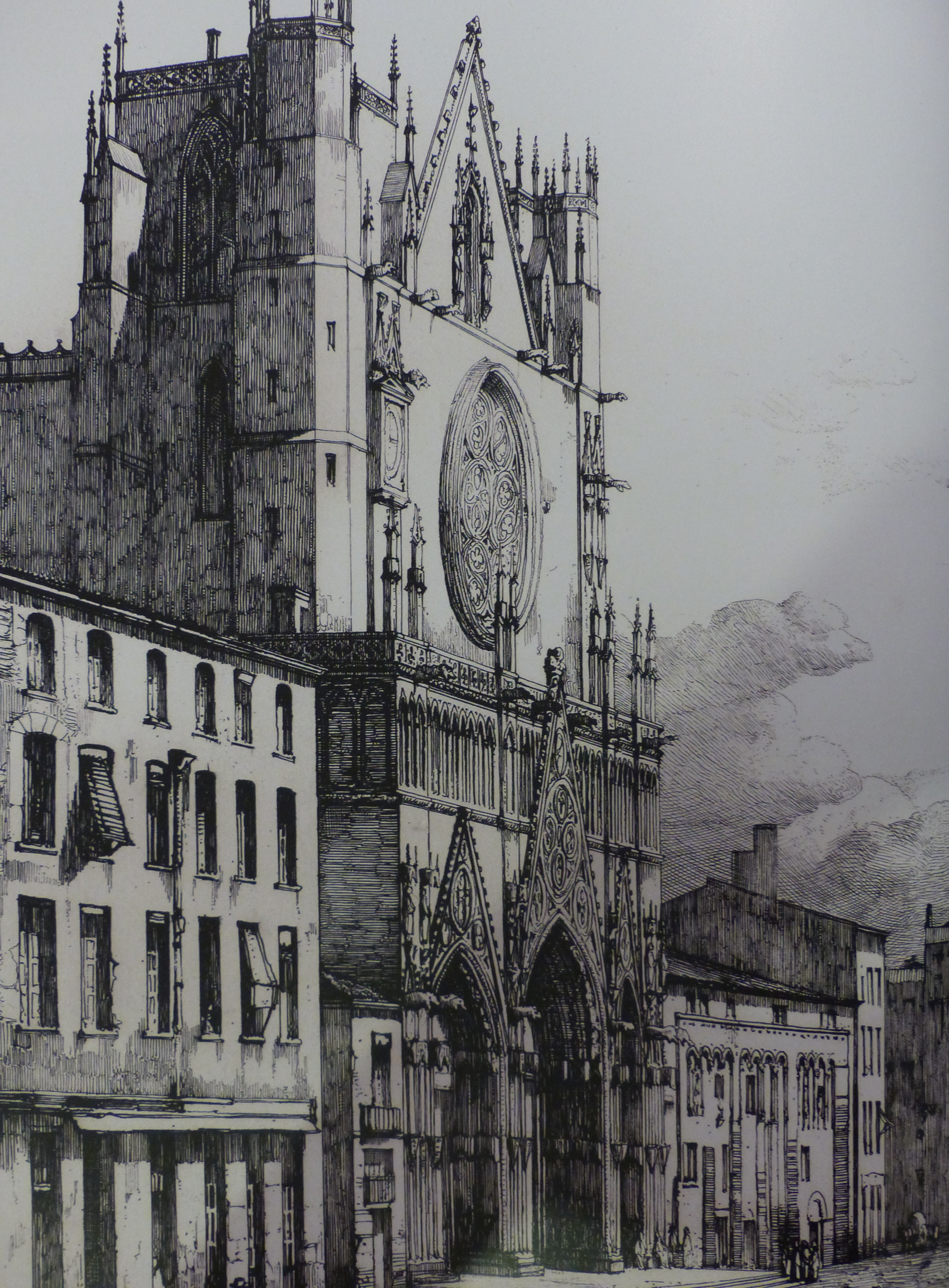 Façade ouest de la primatiale Saint-Jean de Lyon. Dessin d'Hippolyte Leymarie, 1843.